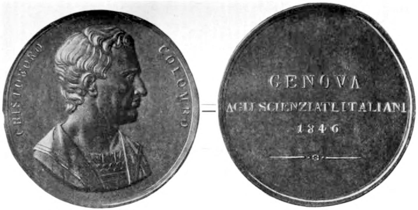 Medaglia per l'ottava riunione degli scienziati italiani